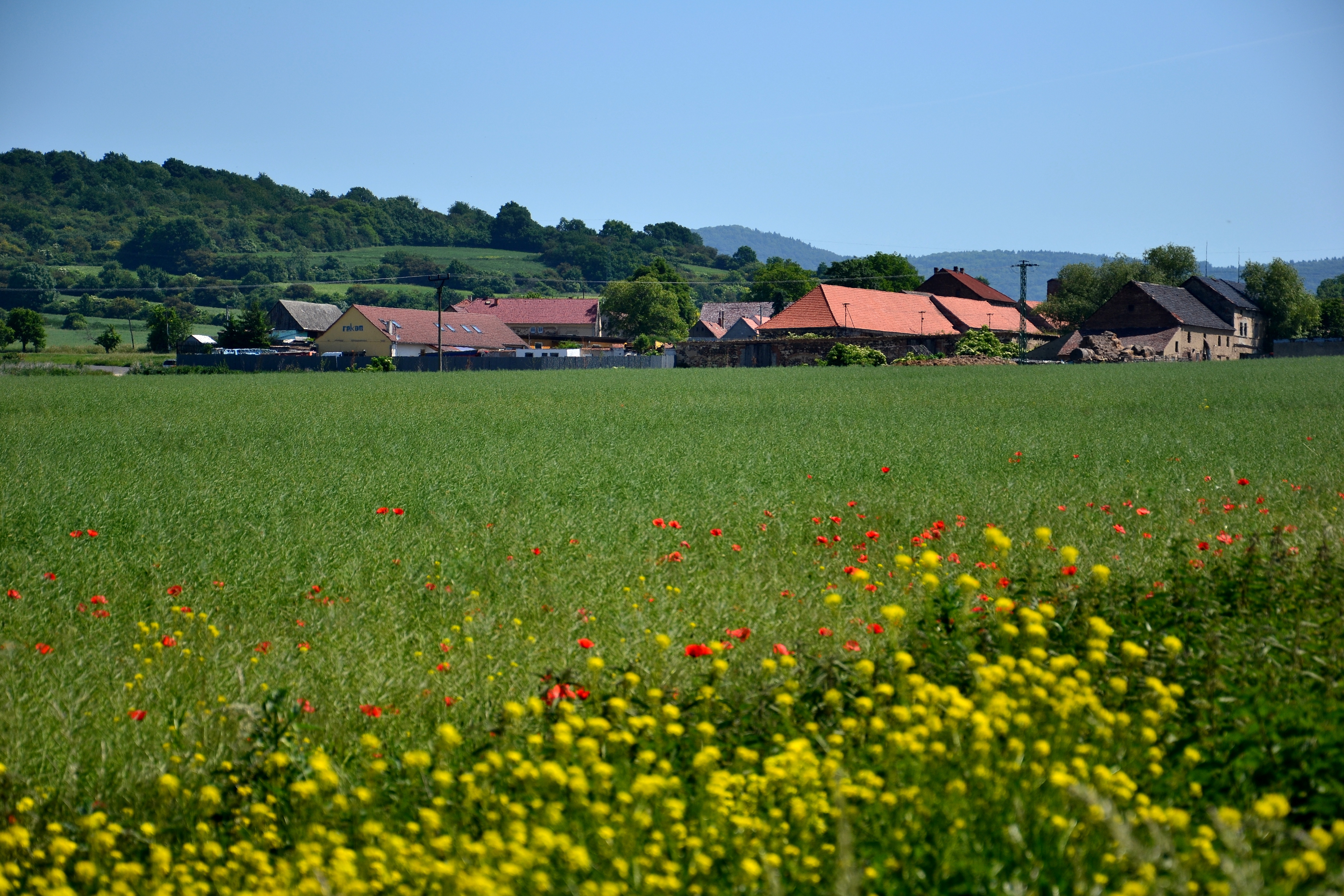 Pohled od západu